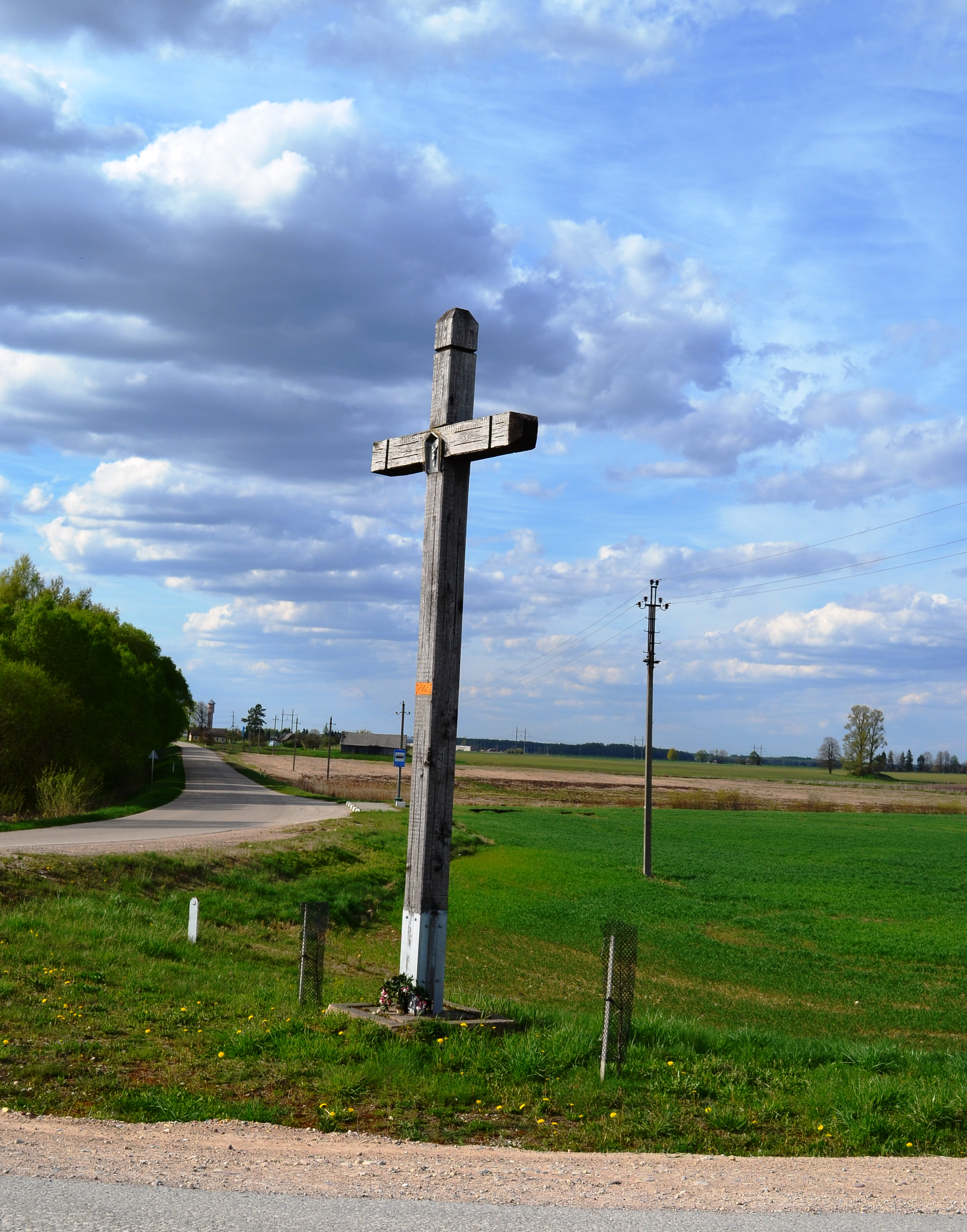 Kryžkelės kryžius, Okainėlių k., Kėdainių raj.